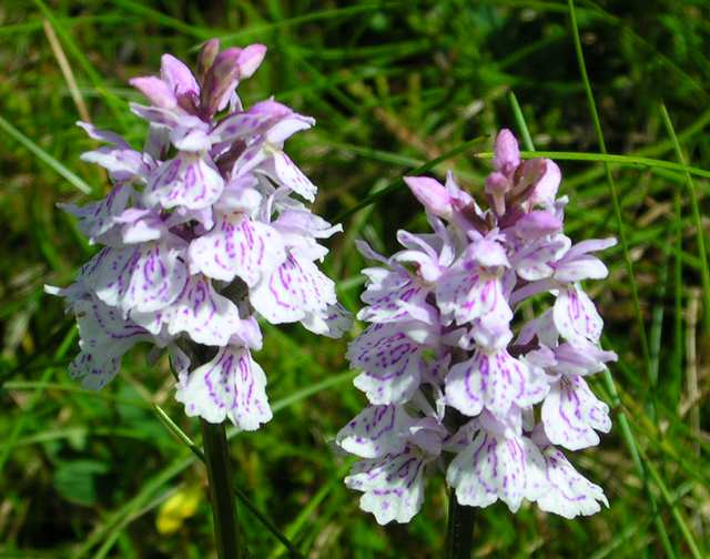 Flekkmarihånd (Dactylorhiza maculata)